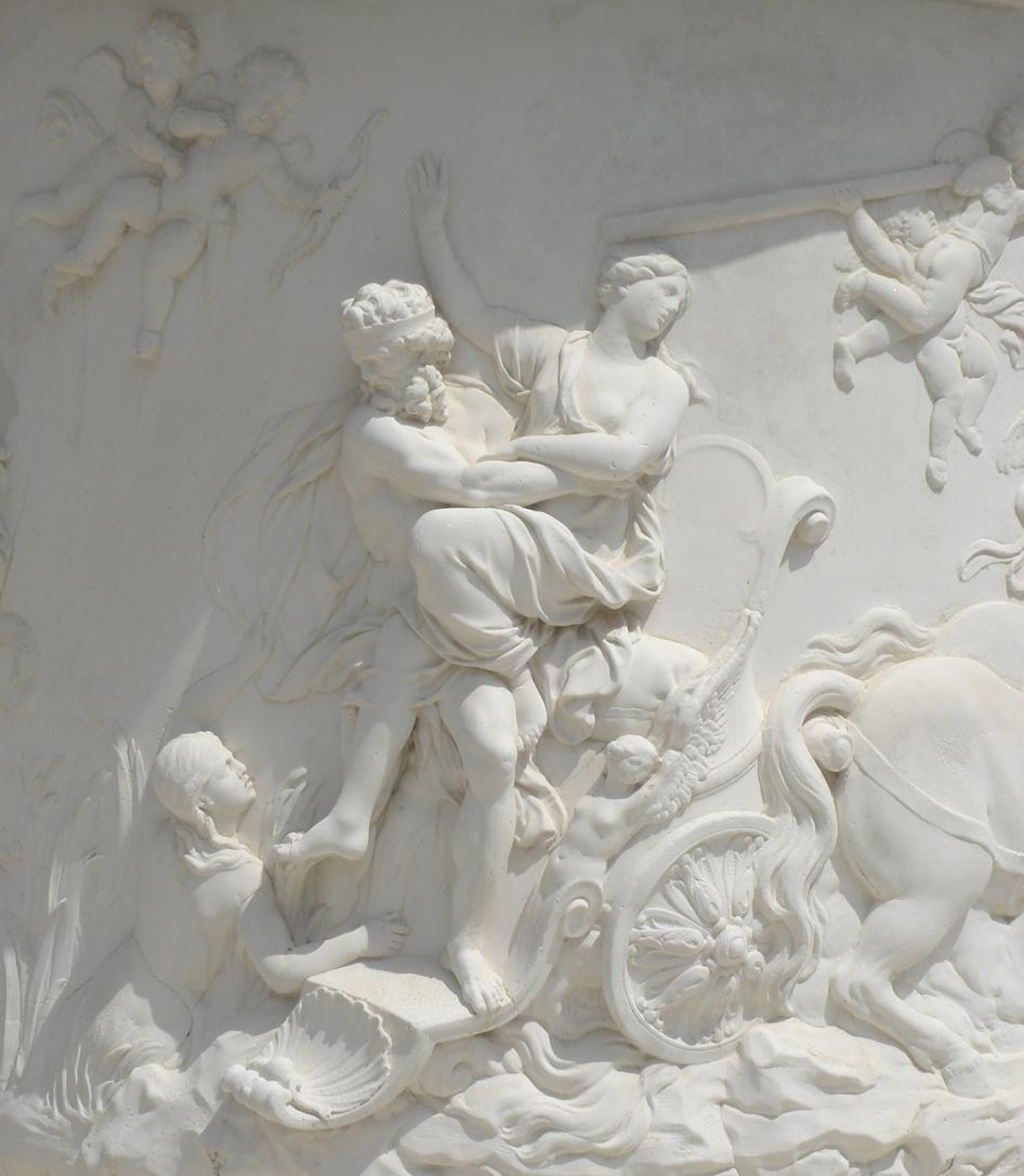 L'enlèvement de Proserpine, Bosquet de la Colonnade à Versailles, bas-relief sculpté par François Girardon